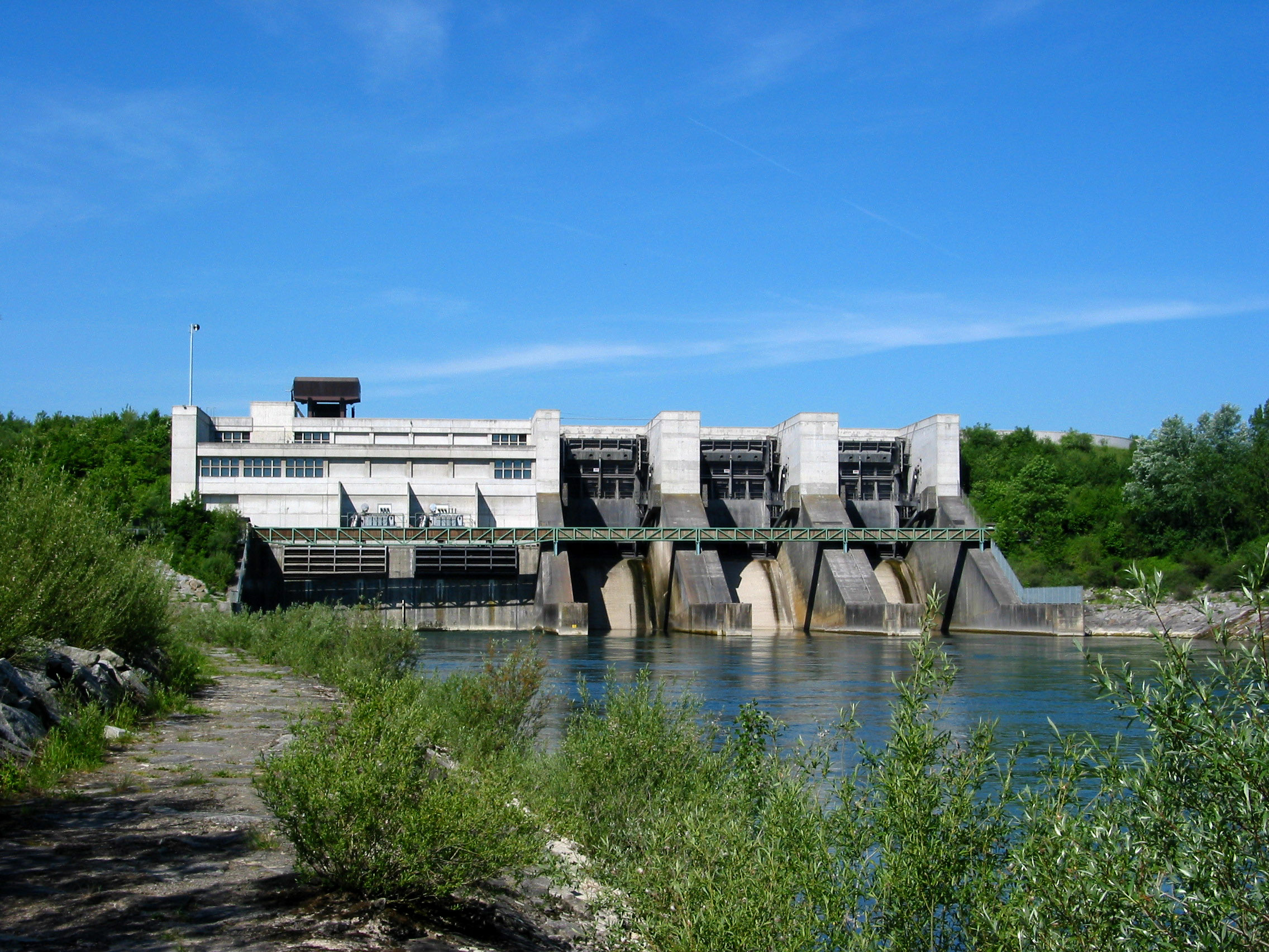 Kraftwerk Traun-Pucking